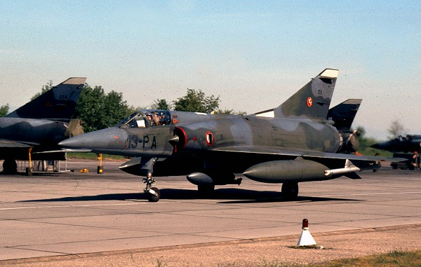 Mirage 5F n°35 "13-PA" from Escadron de Chasse 2/13 "Alpes".